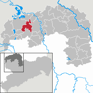 Schönwölkau in Saxony - Landkreis Nordsachsen